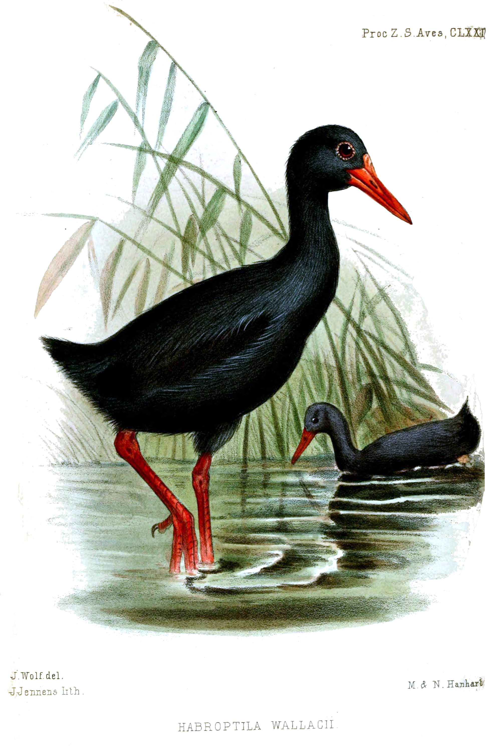 Habroptila wallacii